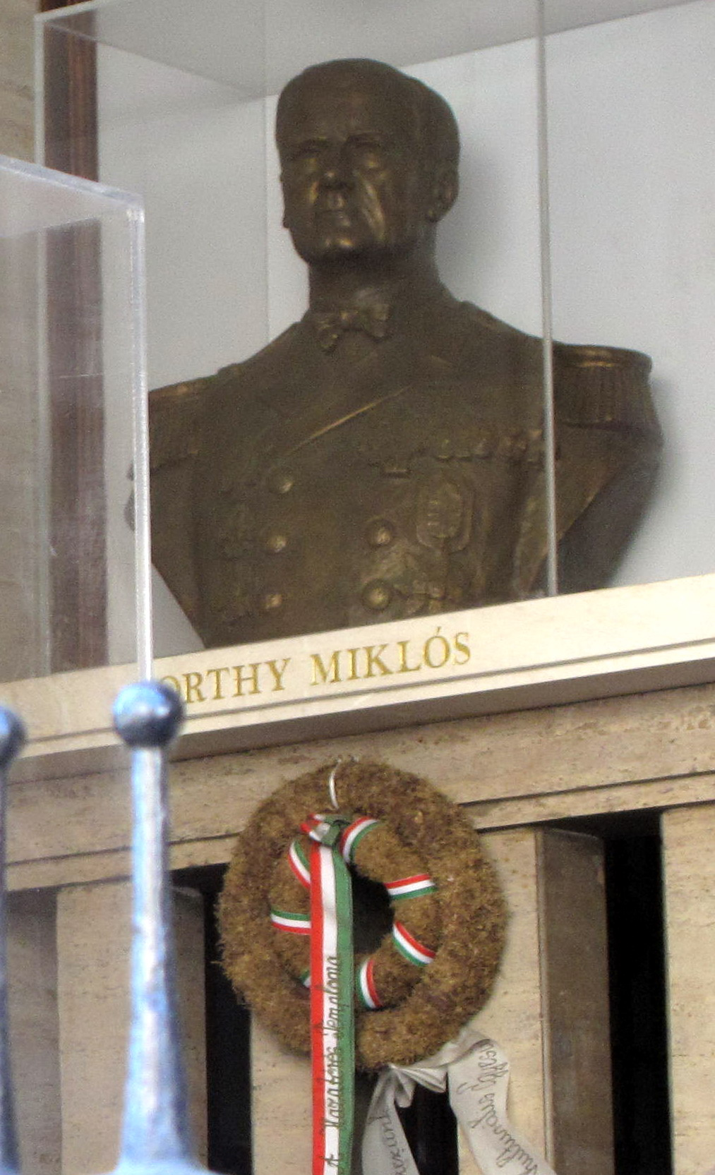 Miklós Horthy, Budapešť